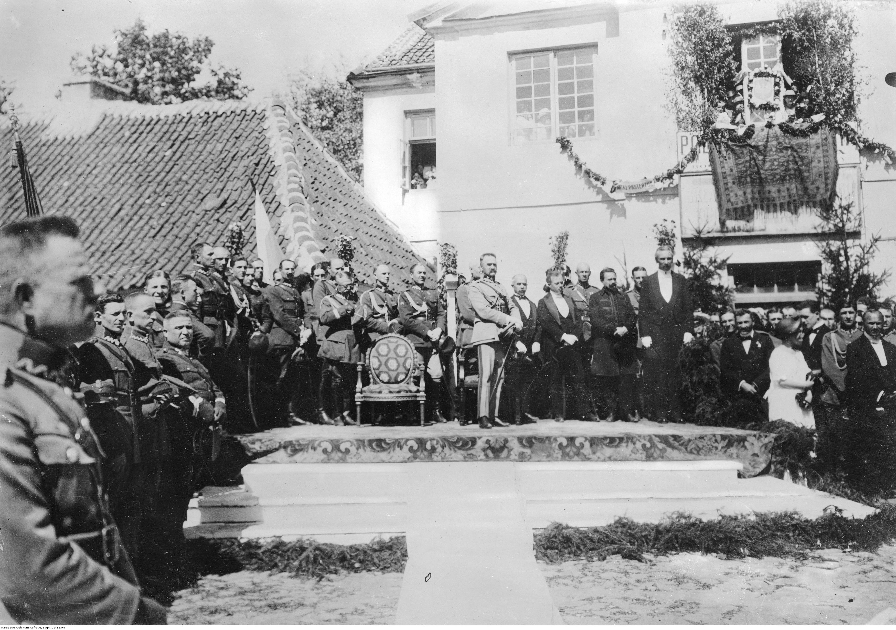 Marszałek Józef Piłsudski w trakcie uroczystości na Rynku Kościuszki. Widoczny także m.in. prezes Rady Miejskiej w Białymstoku Feliks Filipowicz (stoi na podwyższeniu, 1. z prawej).